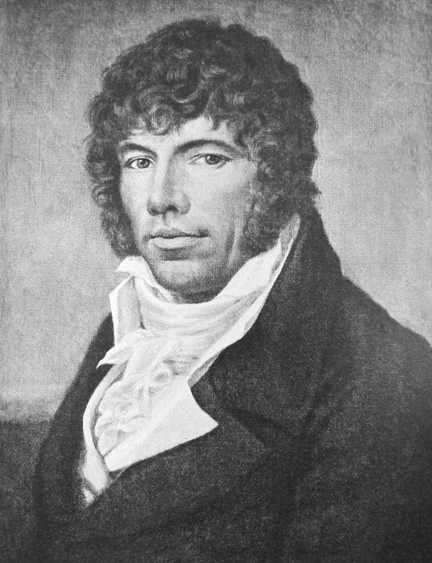 Jens Immanuel Baggesen (15. februar 1764 i Korsør - 3. oktober 1826 i Hamburg) var en dansk forfatter.